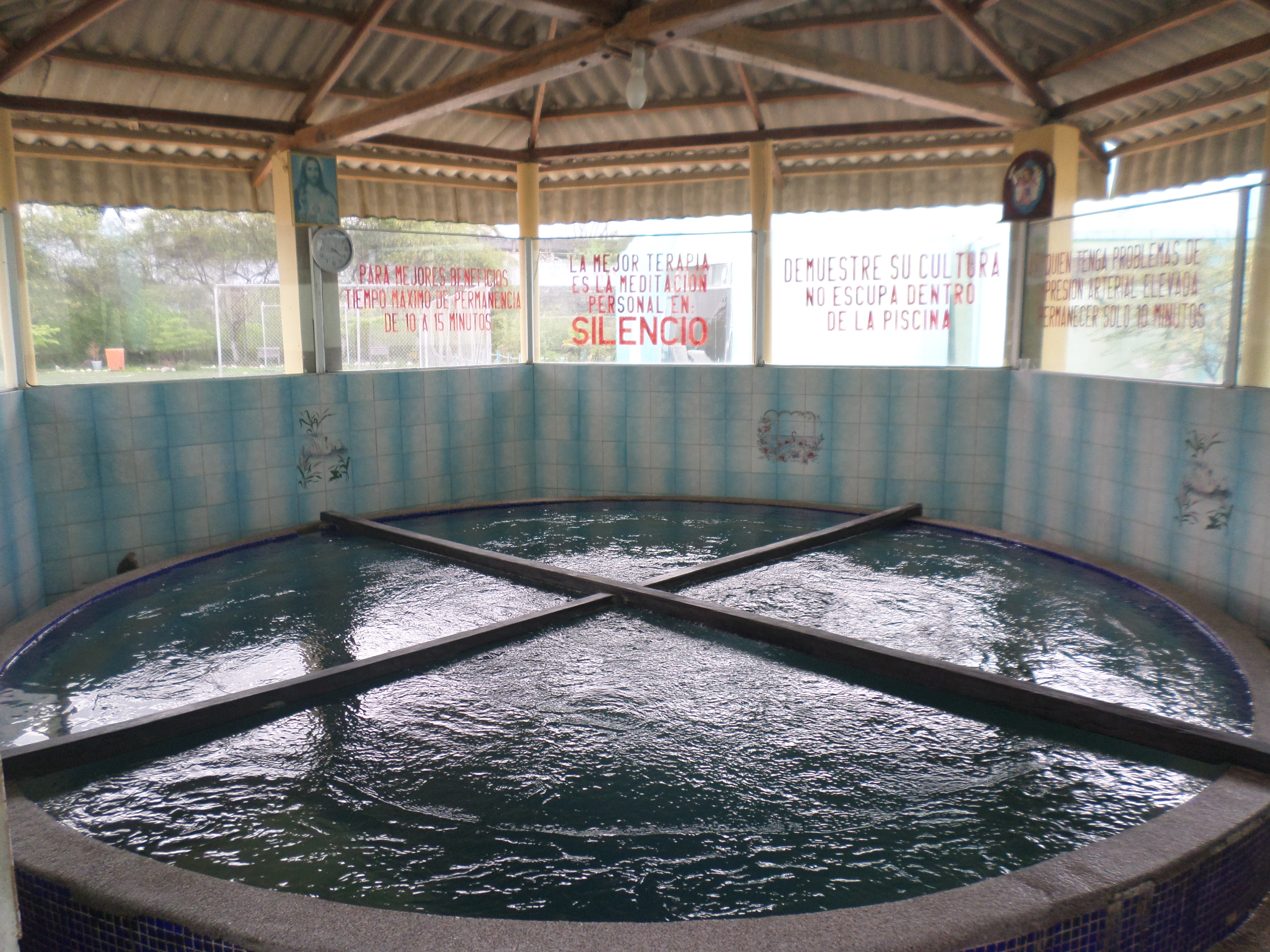 Vista de la piscina de agua caliente o (volcansito)